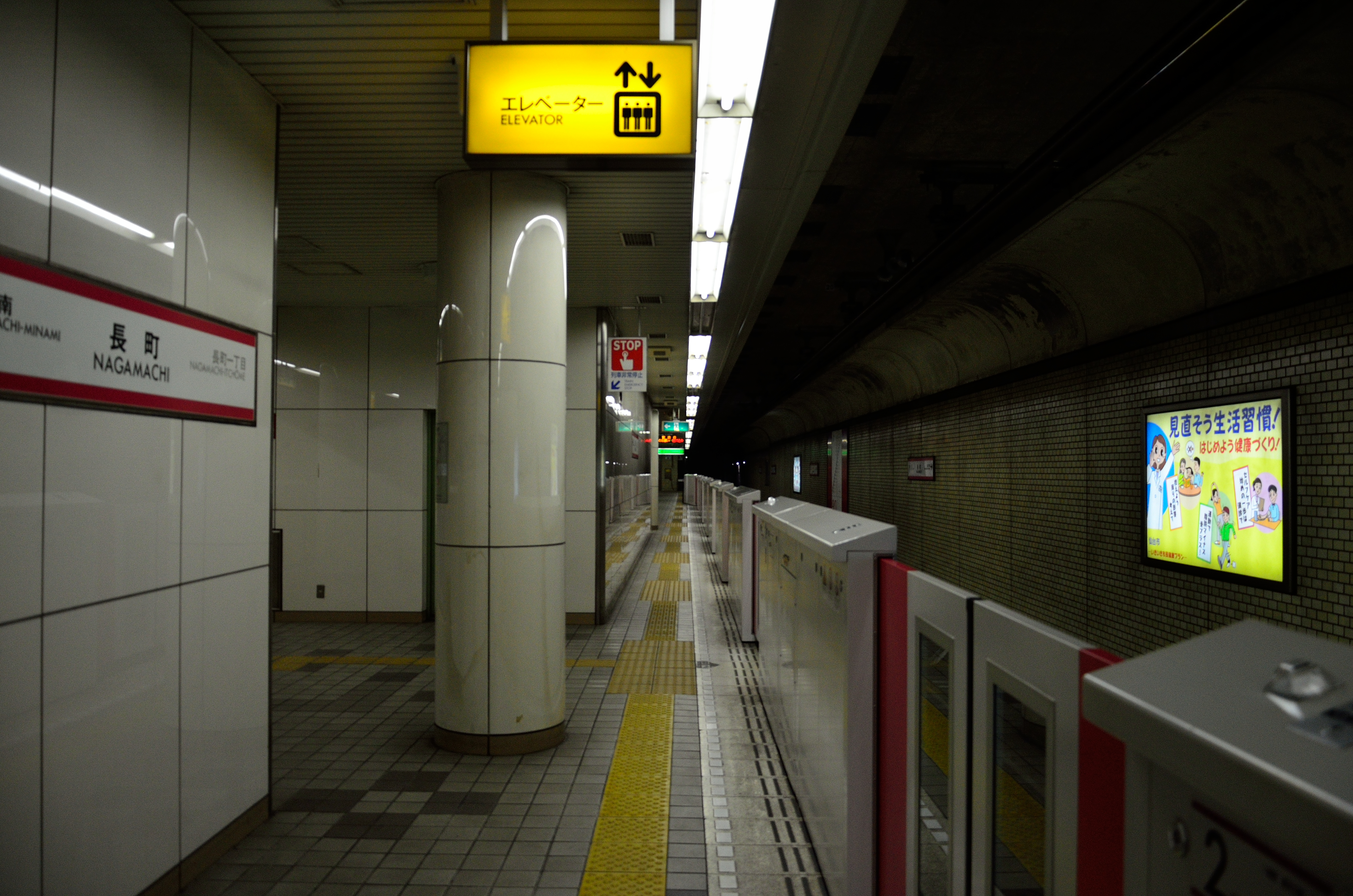 仙台市地下鐵長町駅月台